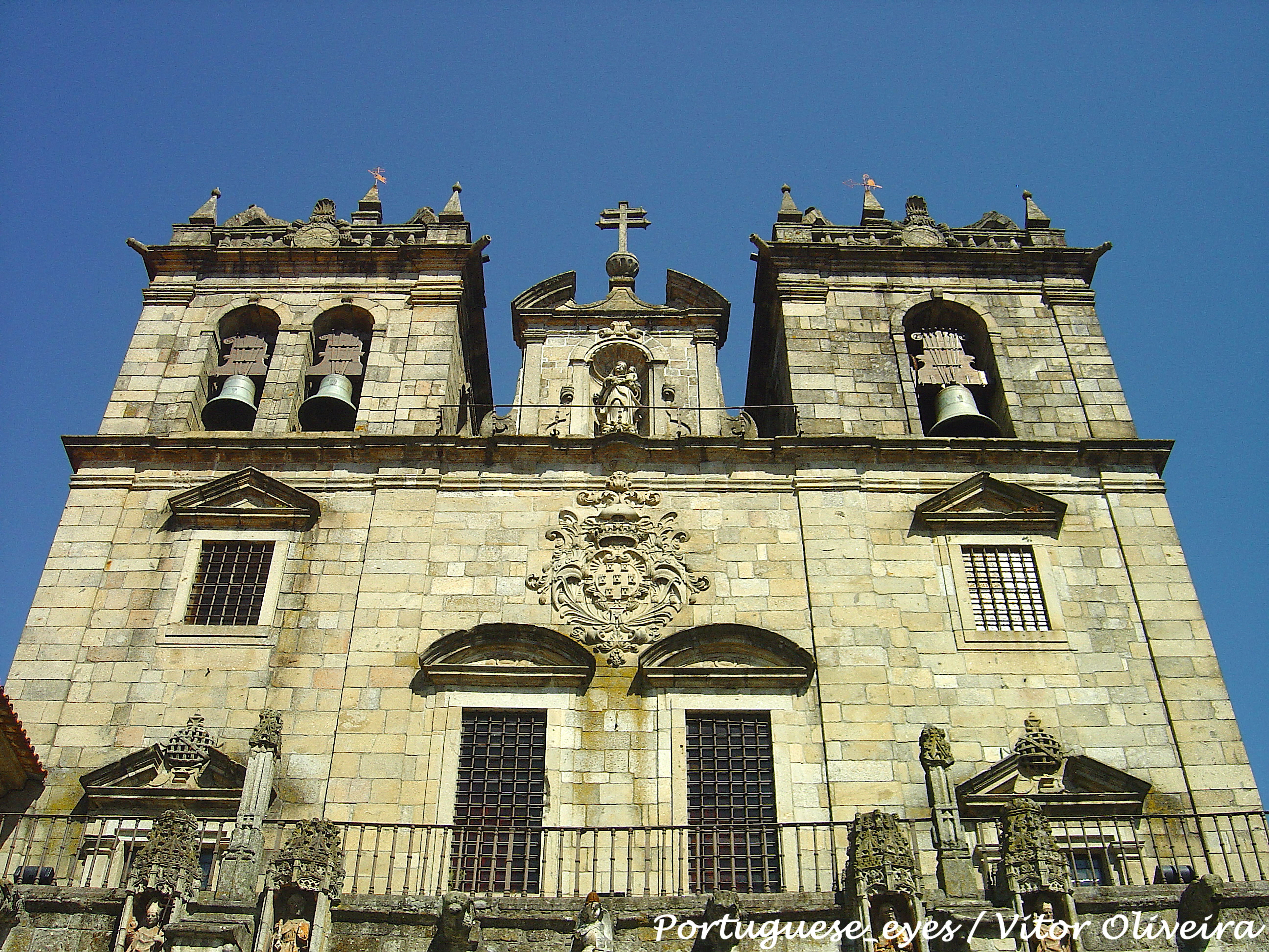 A Sé de Braga, a mais antiga arquidiocese de Portugal é o ex-libris da cidade. Mandada construir no séc. XII por D. Henrique e D. Teresa, que têm os seus túmulos no claustro, rivalizava o seu poder com a Sé de Santiago de Compostela. Nela se encontram testemunhos artísticos dos vários séculos que atravessou. Do estilo românico inicial, conservam-se a Porta do Sol, a planta com deambulatório, o pórtico principal e a absidíola do claustro de Santo Amaro. Foram seus arquitectos os prelados do Mosteiro de Cluny (França), São Giraldo e Maurício Brudino. No séc. XV, o gótico impôs-se na construção da galilé de entrada no templo. No interior, podemos encontrar um túmulo de talhe gótico-flamengo, pertencente ao filho do rei D. João I, o Infante D. Afonso. Do reinado de D. Manuel, no século seguinte, introduziram-se outros elementos decorativos em que se destaca a Pia Baptismal e, no exterior da capela-mor, um nicho com a estátua de Nossa Senhora do Leite atribuída a Nicolau Chanterenne, que integra o brasão da cidade. O estilo barroco, não deixou também de marcar presença, sobretudo na decoração interior dos altares, nas obras de talha dourada, no grandioso orgão da capela-mor e nas duas curiosas torres sineiras, que marcam a fachada exterior. A completar a visita, não perca o Museu do Tesouro da Sé. See where this picture was taken. [?]